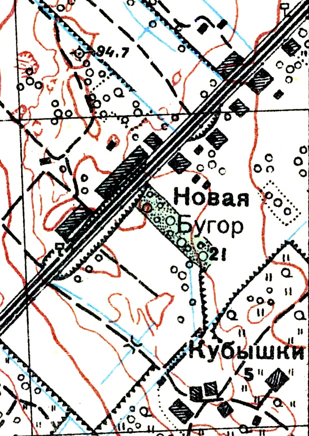 Топографическая карта Ленинградской области, квадрат О-36-13-А-б (Пос. Тайцы), деревня Бугры